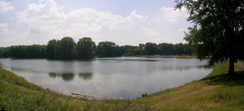 Пруд Тайрук, 12.07.2009 (панорама)